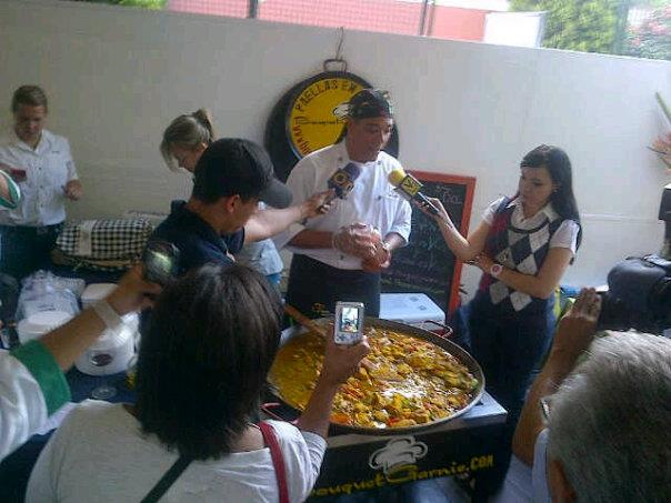 Globovision y venevision evento gastronomico en la Quinta la Esmeralda